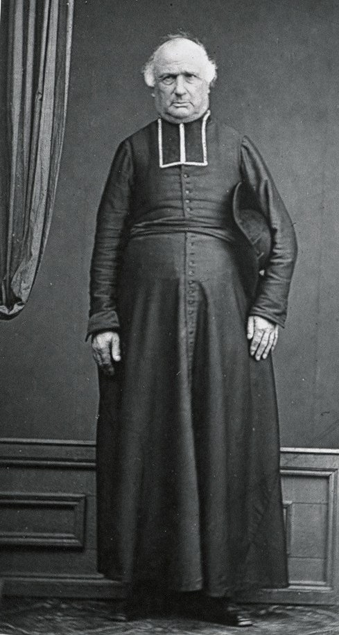 Dominique Peyramale (1811-1877), curé de Lourdes de 1855 à 1877, au temps des apparitions à Bernadette Soubirous.